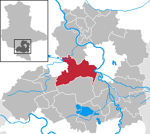 Teutschenthal in Saxony-Anhalt - Saalekreis